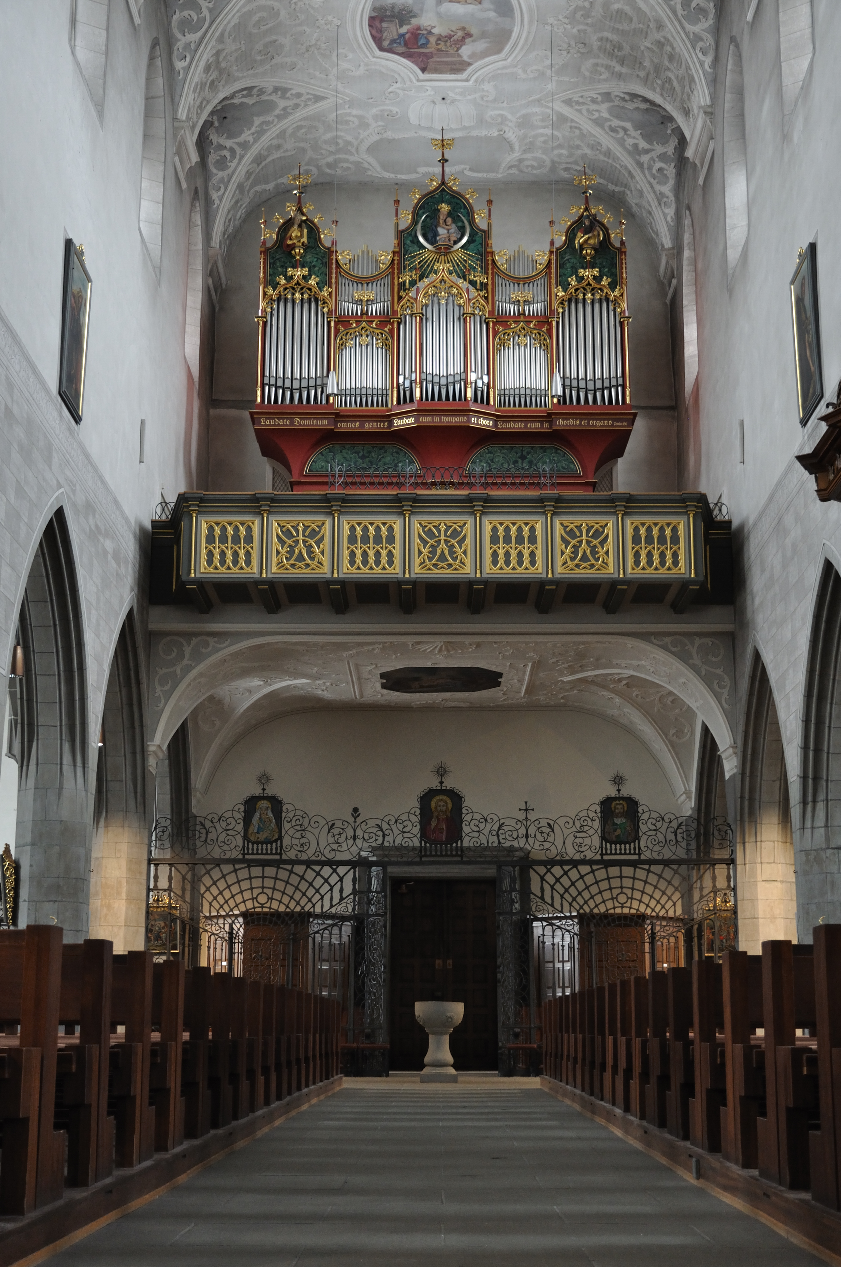 Im Münster Unserer Lieben Frau, Radolfzell